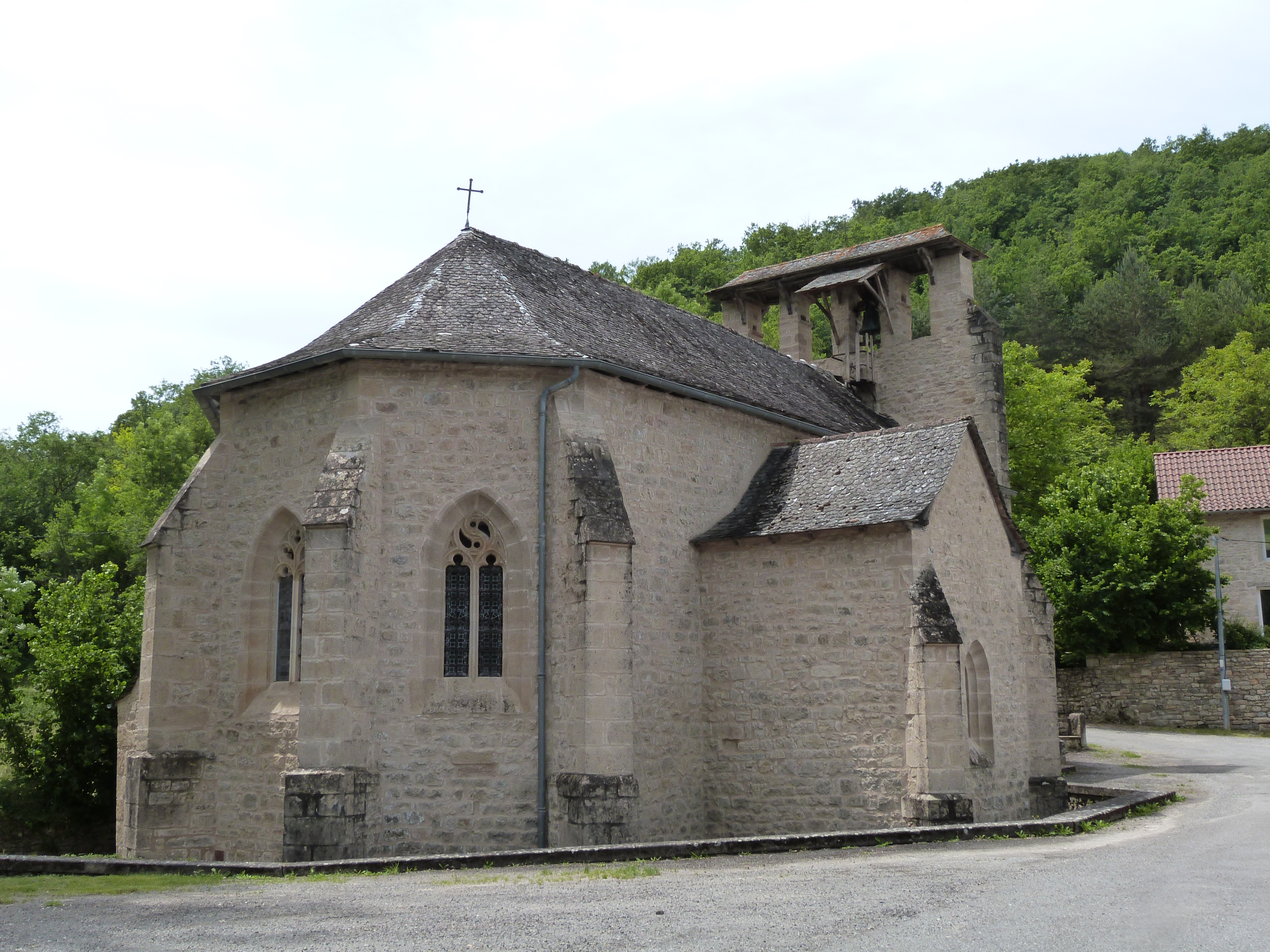 Eglise de la Rouquette (Aveyron)